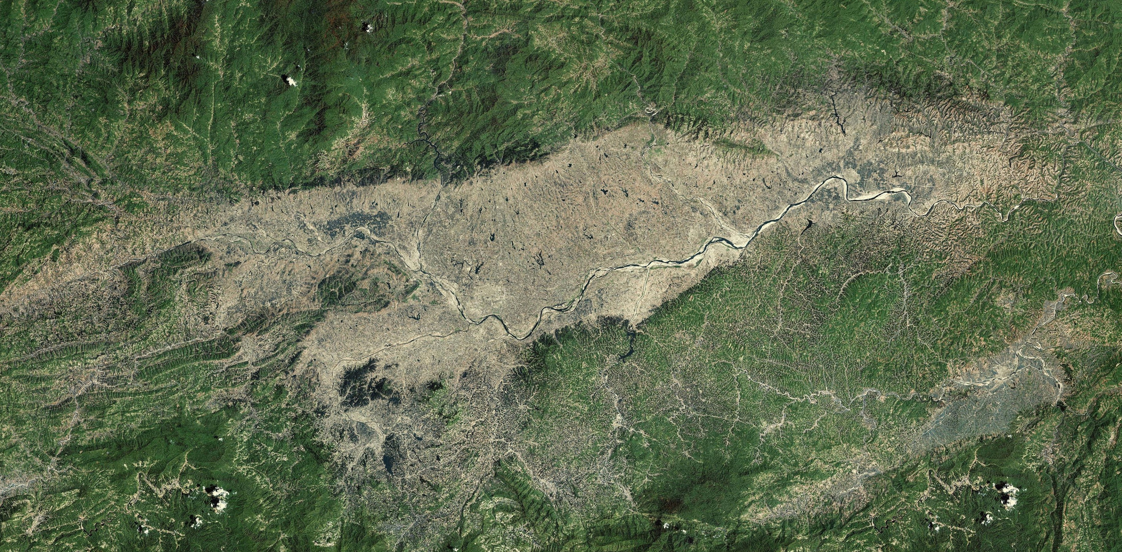 汉中卫星图